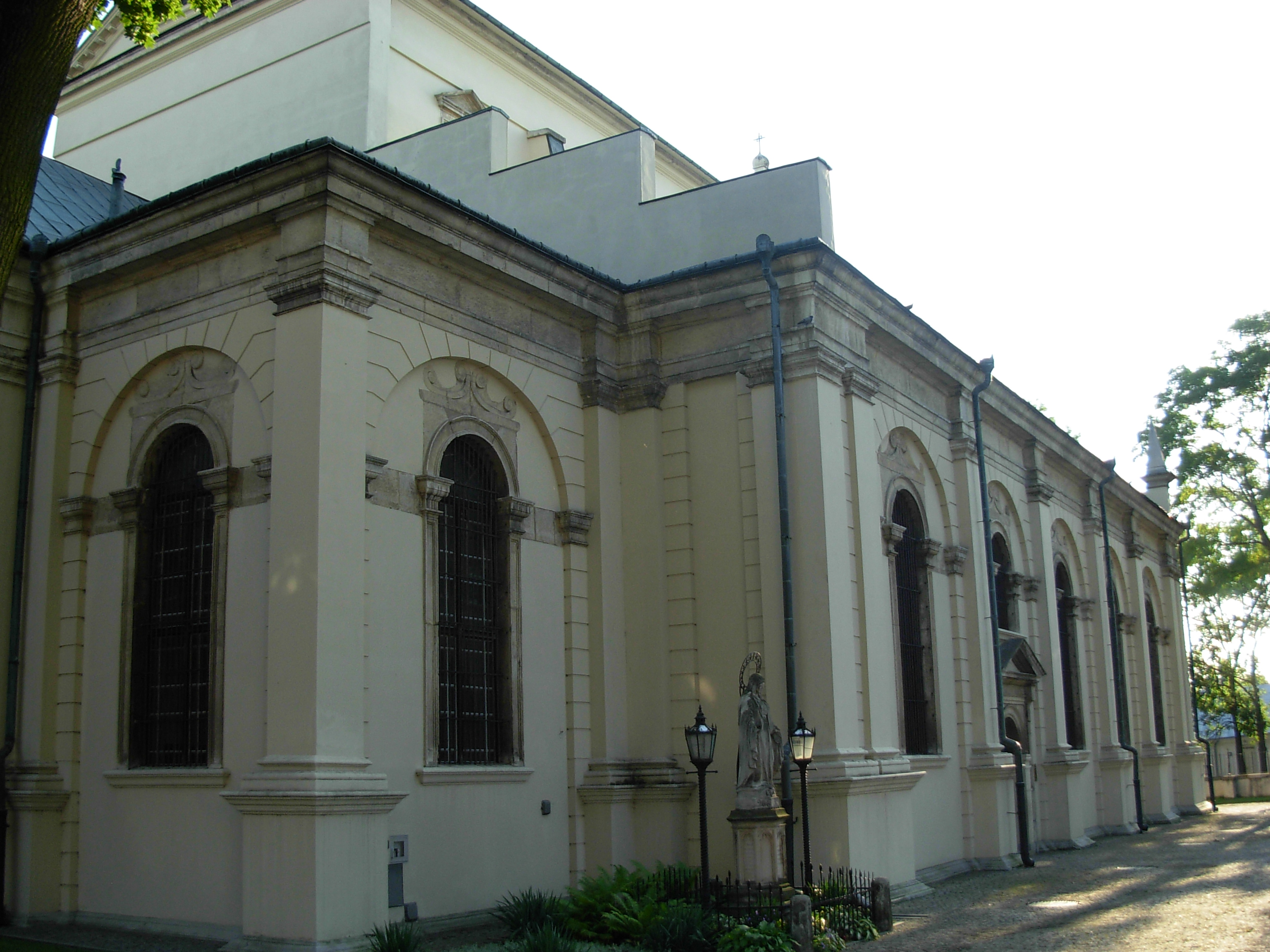 Zamość, Poland.